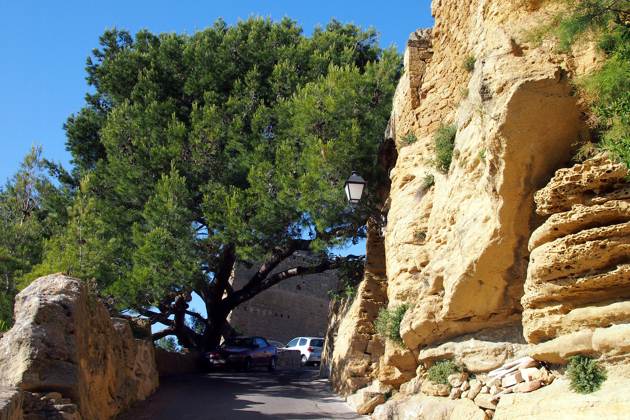 Pin d'Alep de Miramas-le-Vieux (Arbre Remarquable de France)